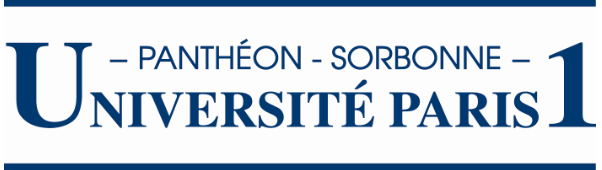 Uparis1